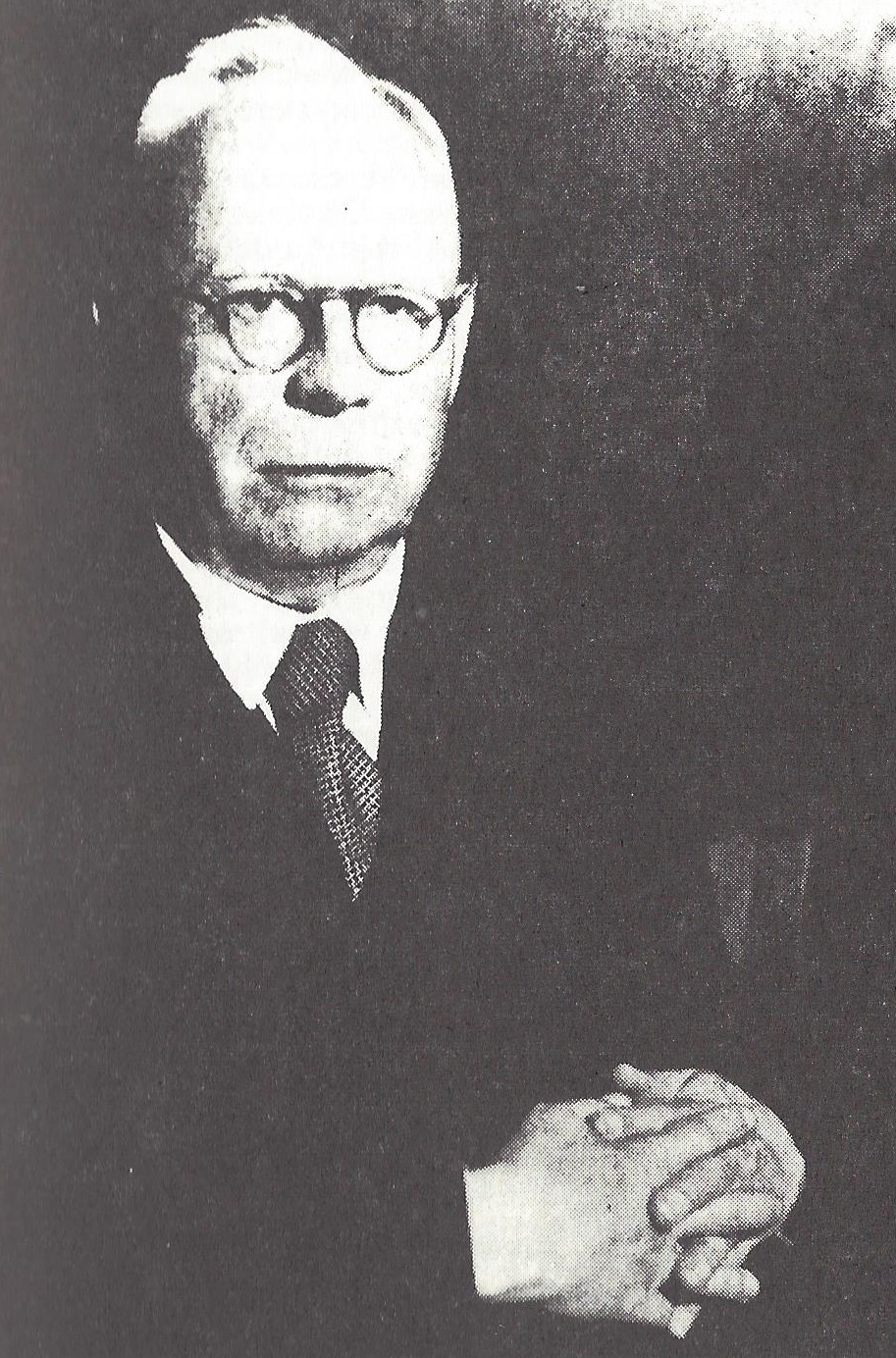 Porträtfotografie des Königsberger Chirurgen Arthur Läwen